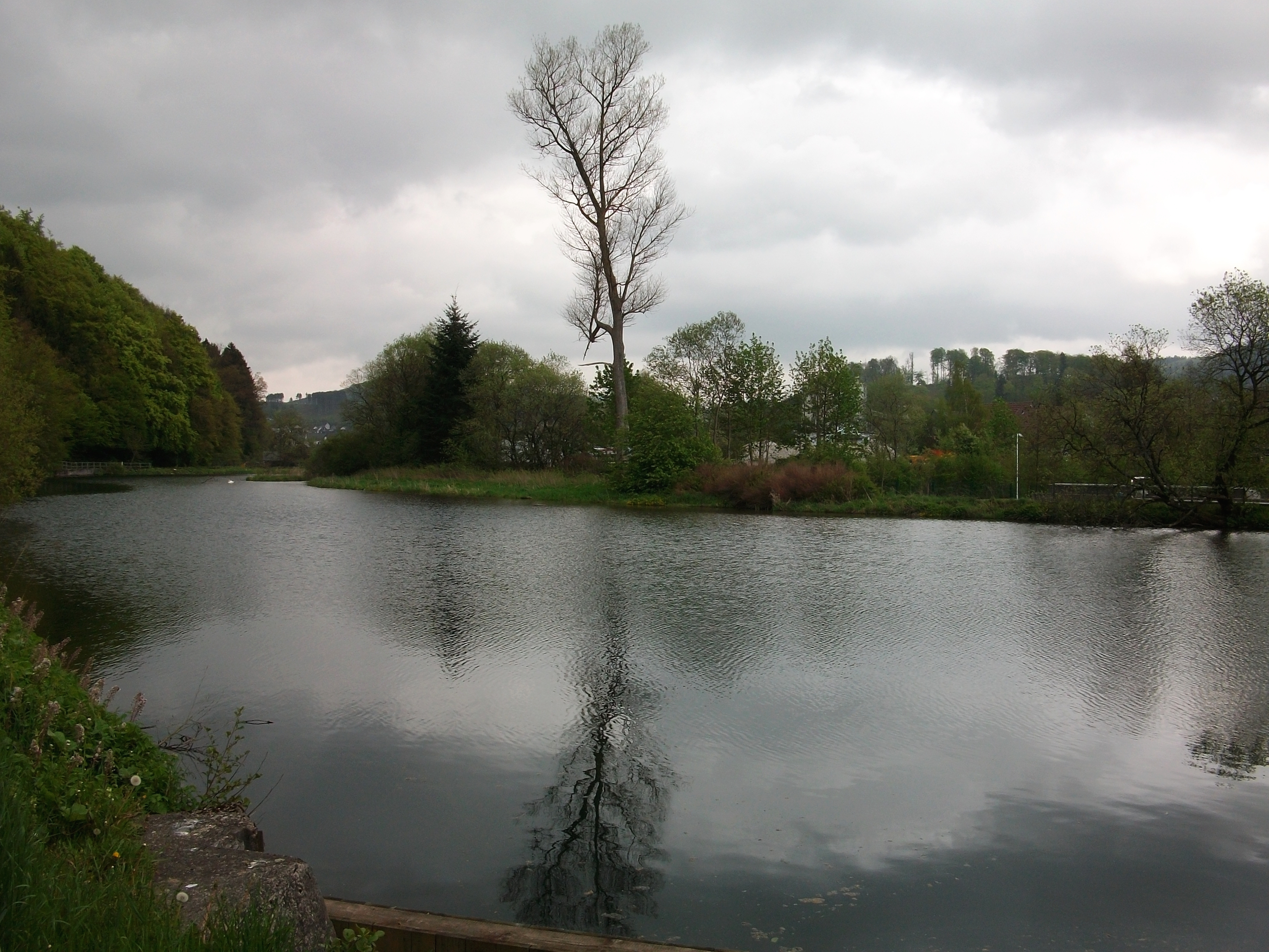 Bestwig-Alfert, Stausee Laufwasserkraftwerk an der Ruhr (Germany)